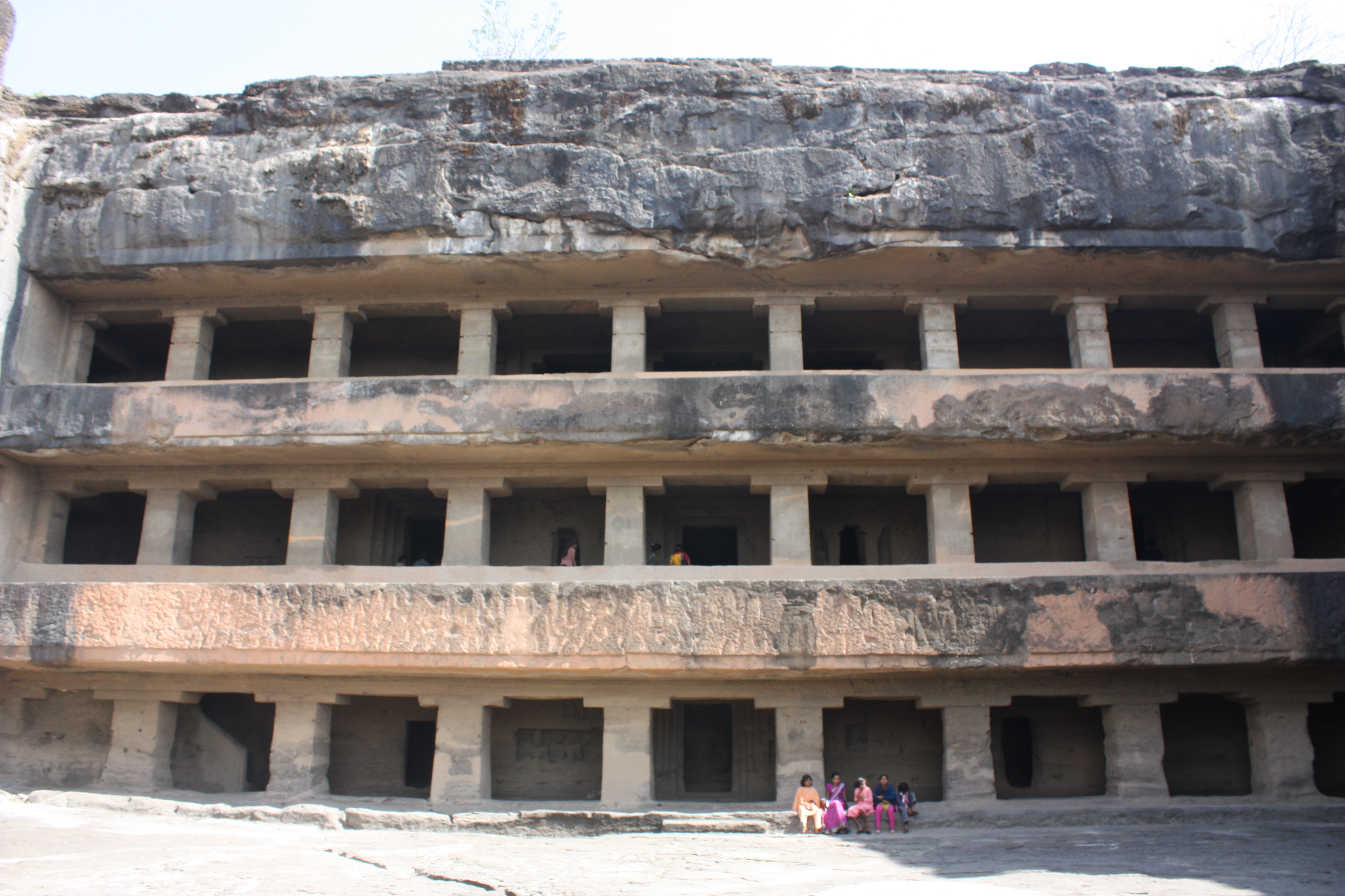 Ellora, cave 11